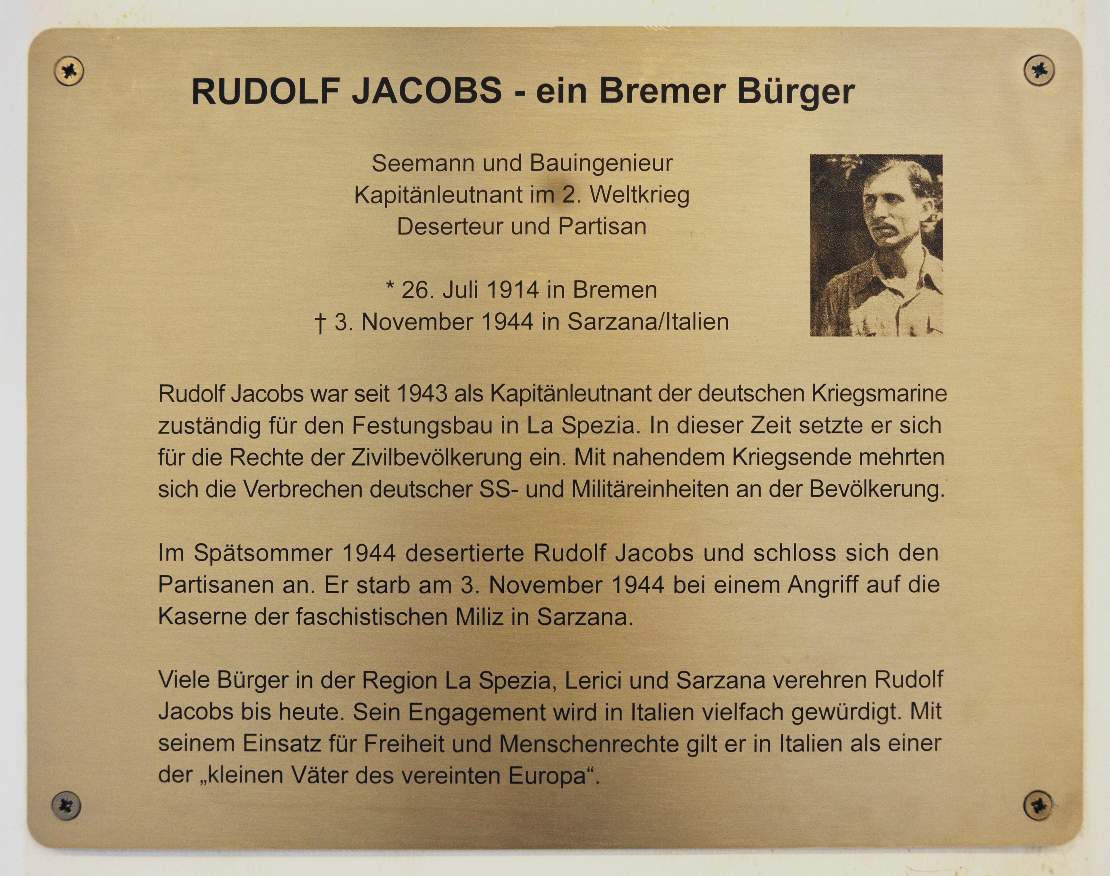 Gedenktafel für Rudolf Jacobs im Gustav-Heinemann-Bürgerhaus in Bremen-Vegesack. Die Gedenktafel befindet sich an einem Pfeiler hinter dem dortigen Denkmal für den unbekannten Deserteur.